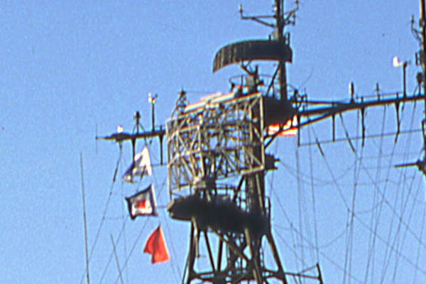 Антенна радара AN/SPS-29 на эсминце DDG-35 «Митшер»